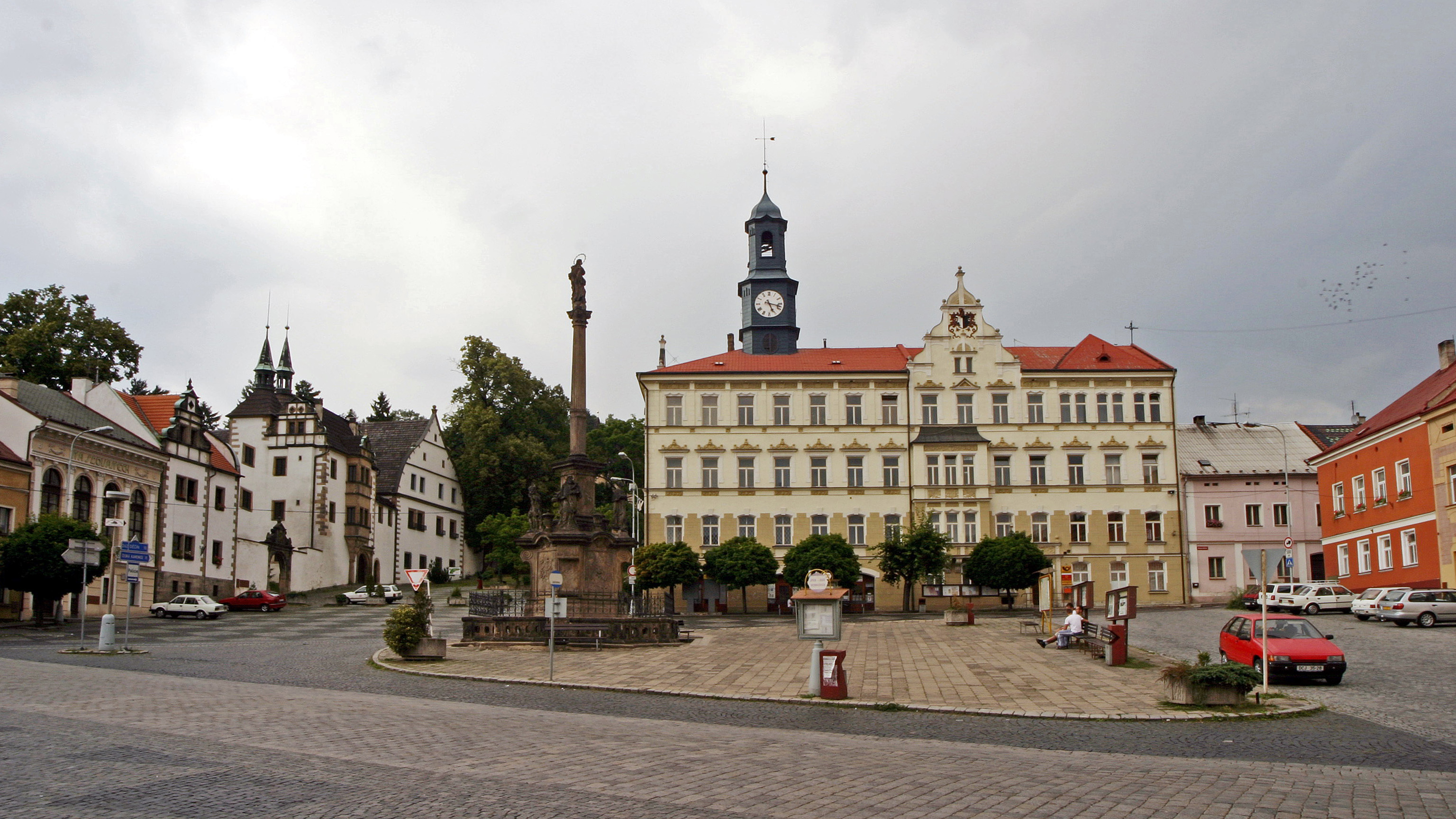 Dolní zámek Benešov nad Ploučnicí v levém horním rohu náměstí